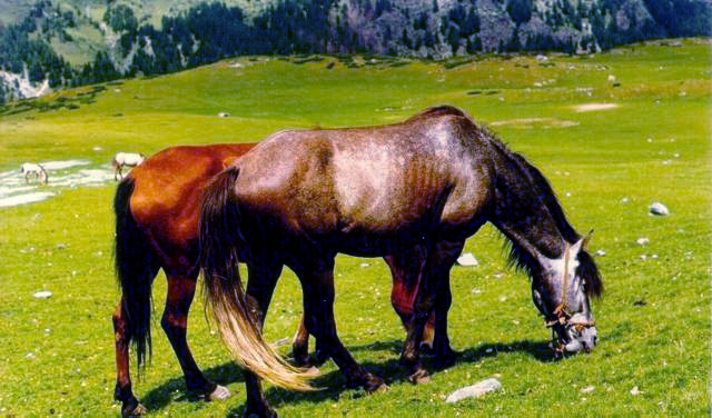 Bosnische Gebirgspferde im Prokletije, Metohija - Serbien